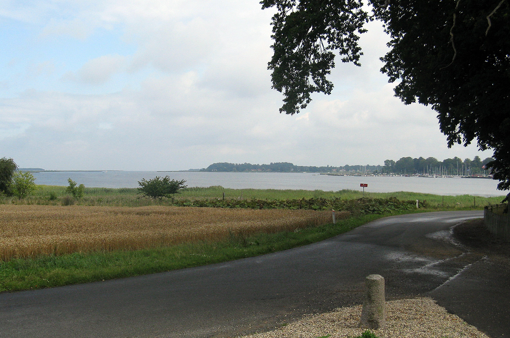 Præstø Fjord set fra Nysø med Præstø Havn i baggrunden.